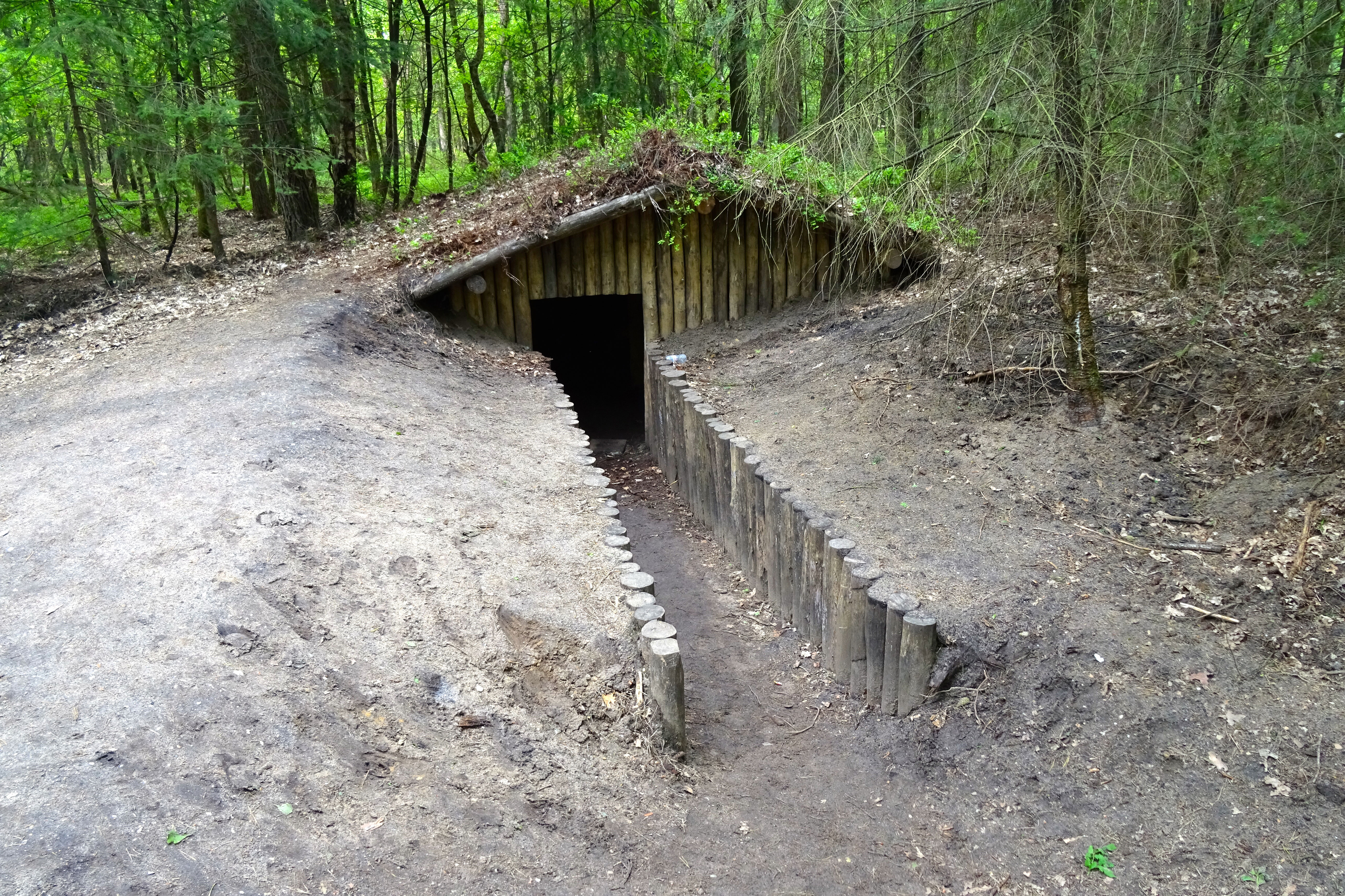 Een van de drie nagebouwde schuilhutten van het verscholen dorp, voor Joodse en andere onderduikers tijdens de Tweede Wereldoorlog